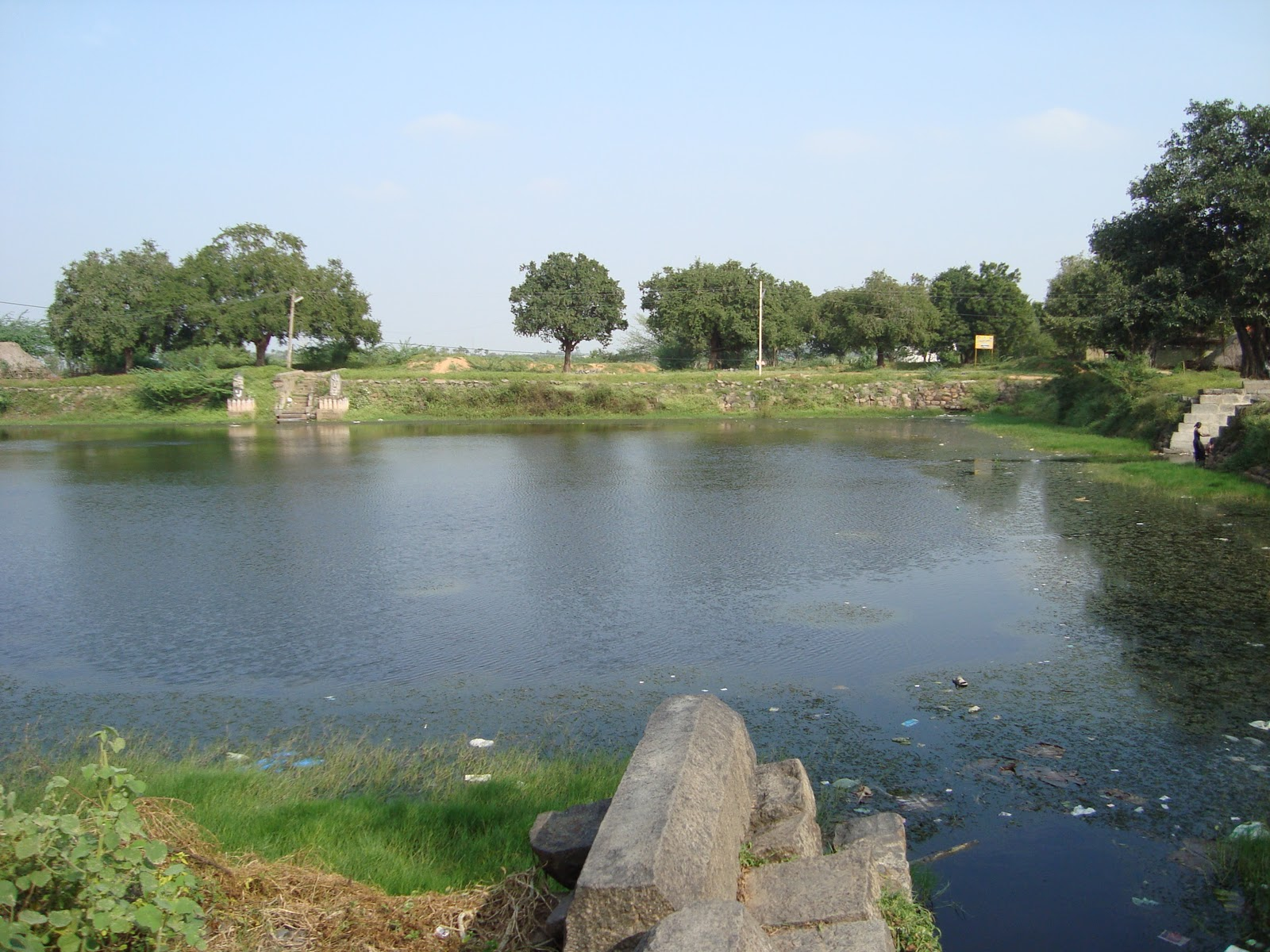 ஊத்துக்காடு எல்லம்மன் கோயில் தெப்பகுளம்